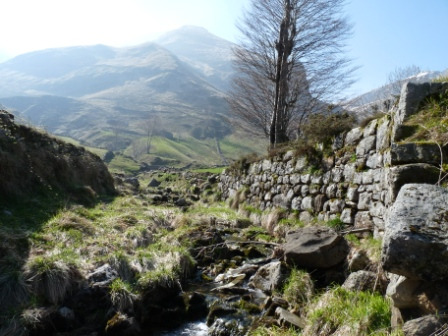 Se trata de una canalizacion que se hizo en la parte baja de la finca de la Pila.